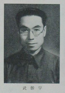 中文（台灣）: 中國人民政治協商會議第一屆全體會議代表